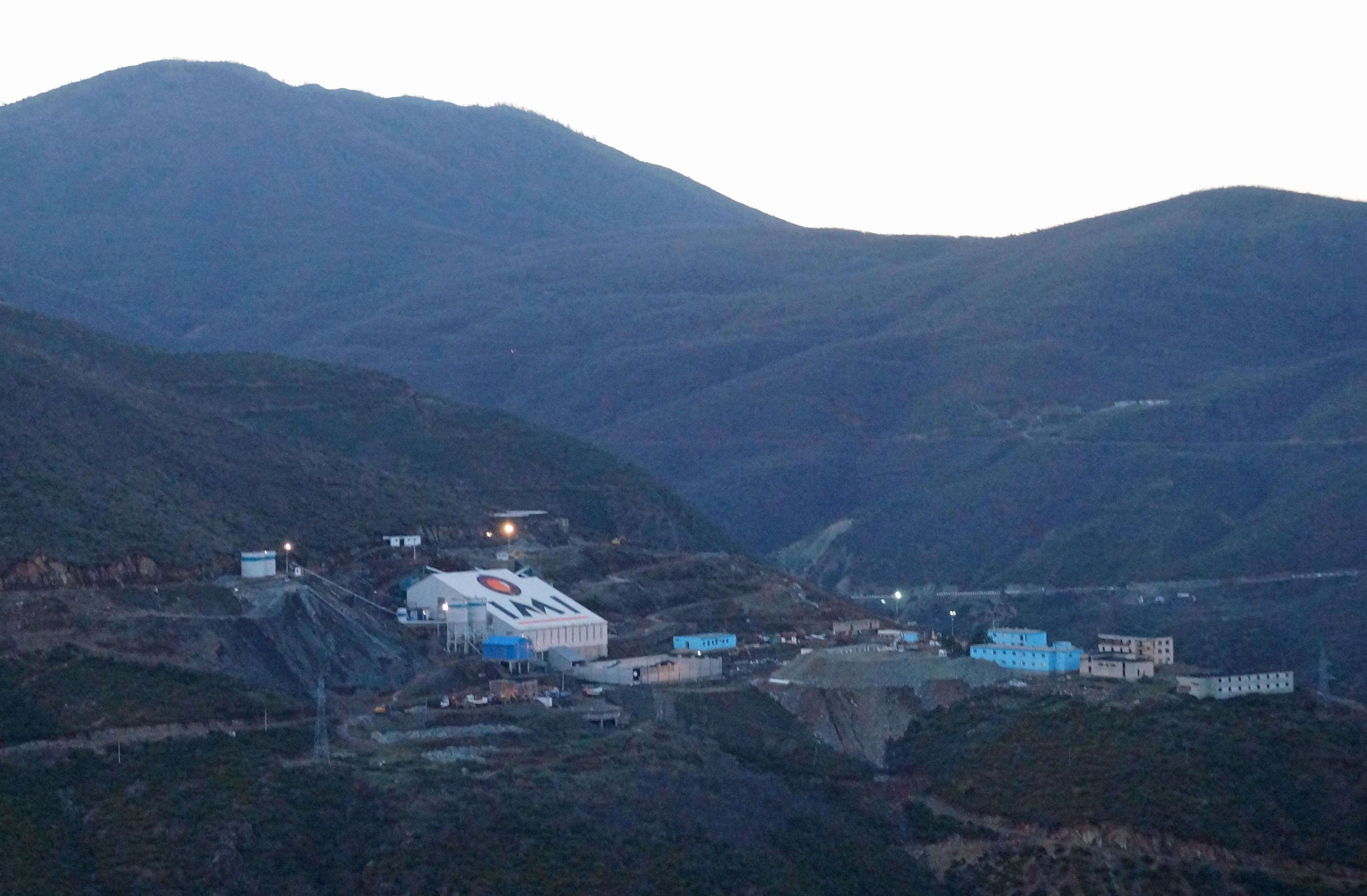 Mine close to Kalimash, Kukës, Albania